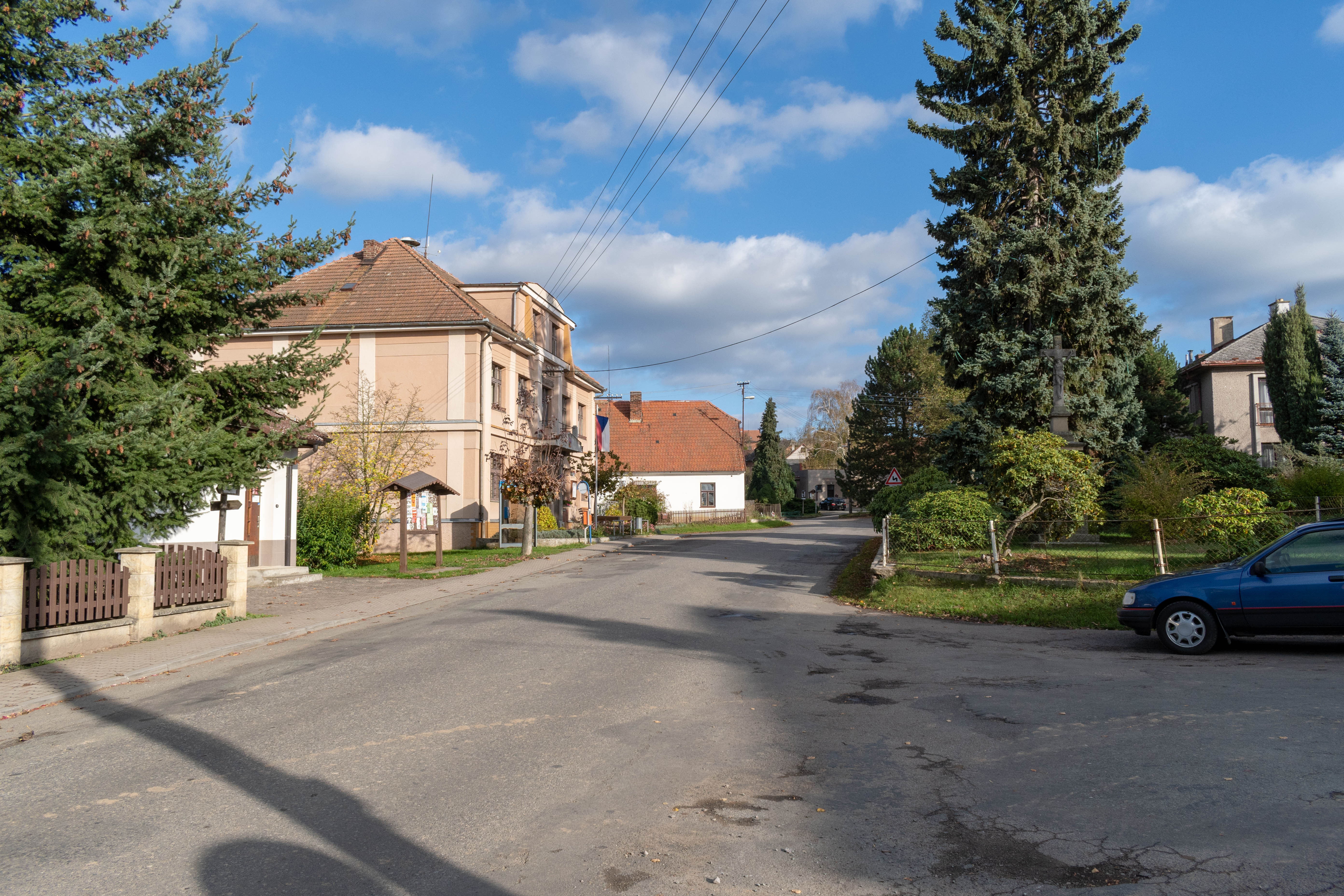 Celkový pohled na obec Chleny